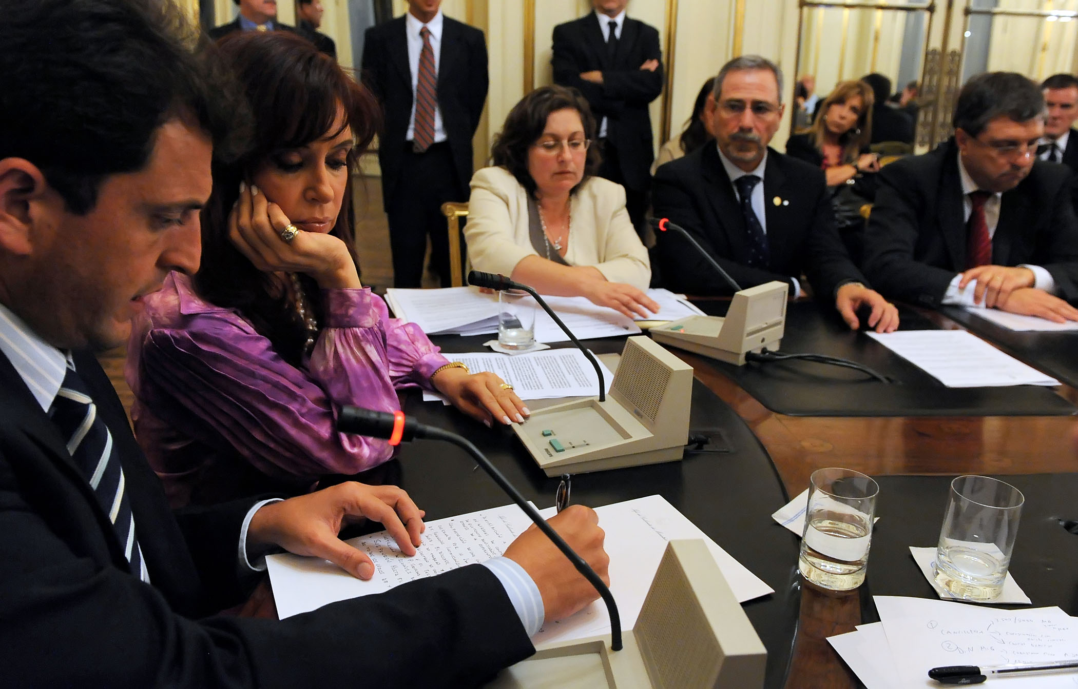 (de izq. a der.) El Jefe de Gabinete Sergio Massa, la Presidenta de la Nación Cristina Fernández, la Ministra de Salud Graciela Ocaña y el secretario de la cartera, Carlos Soratti, durante reunión multiministerial por la problemática de la gripe porcina.